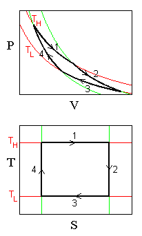 מעגל קרנו